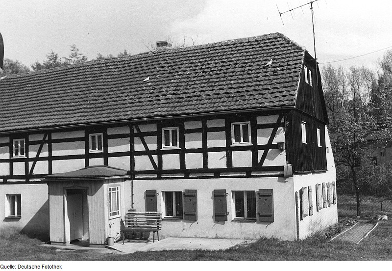 Original image description from the Deutsche Fotothek Bernsdorf-Zeißholz. Ehem. Untermühle, Wohnhaus